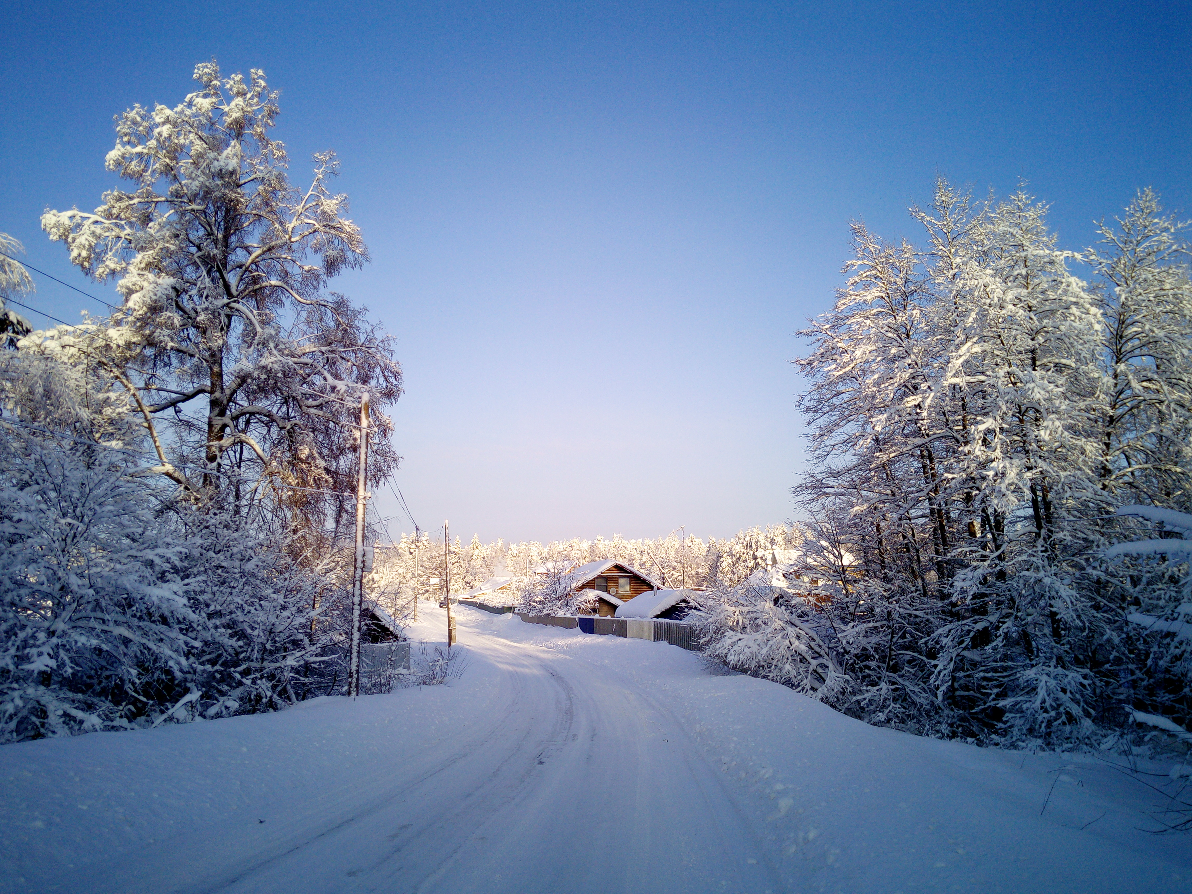 Россия. Владимирская область. Петушинский район, деревня Гнездино. Февраль 2018 года